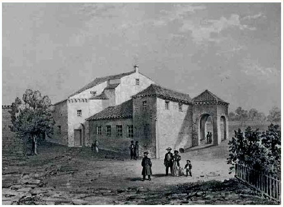 Армянская церковь Сурб Саркис в Феодосии, В. О. Руссен Villeneuve E. Album historique et pittoresque de la Tauride – Vol. 1 - 25. — Paris, 1858. — 200 с.